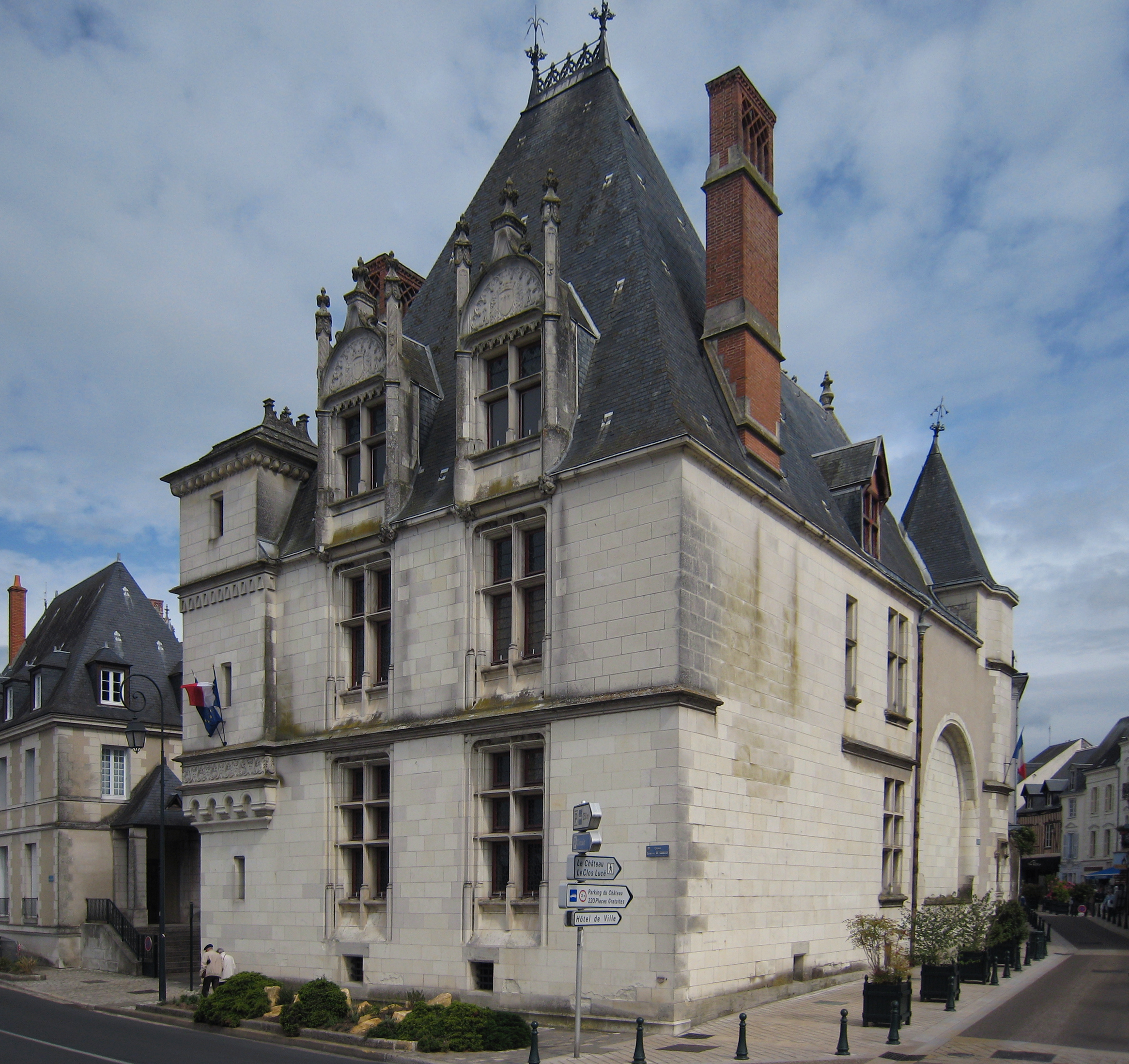 Amboise an der Loire im Département Indre-et-Loire/Frankreich - Hotel de Ville, frühes 16. Jahrhundert